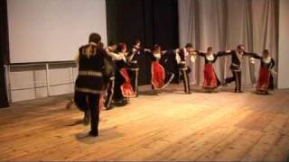 Կարին համույթը պարում է Ծաղկաձորի